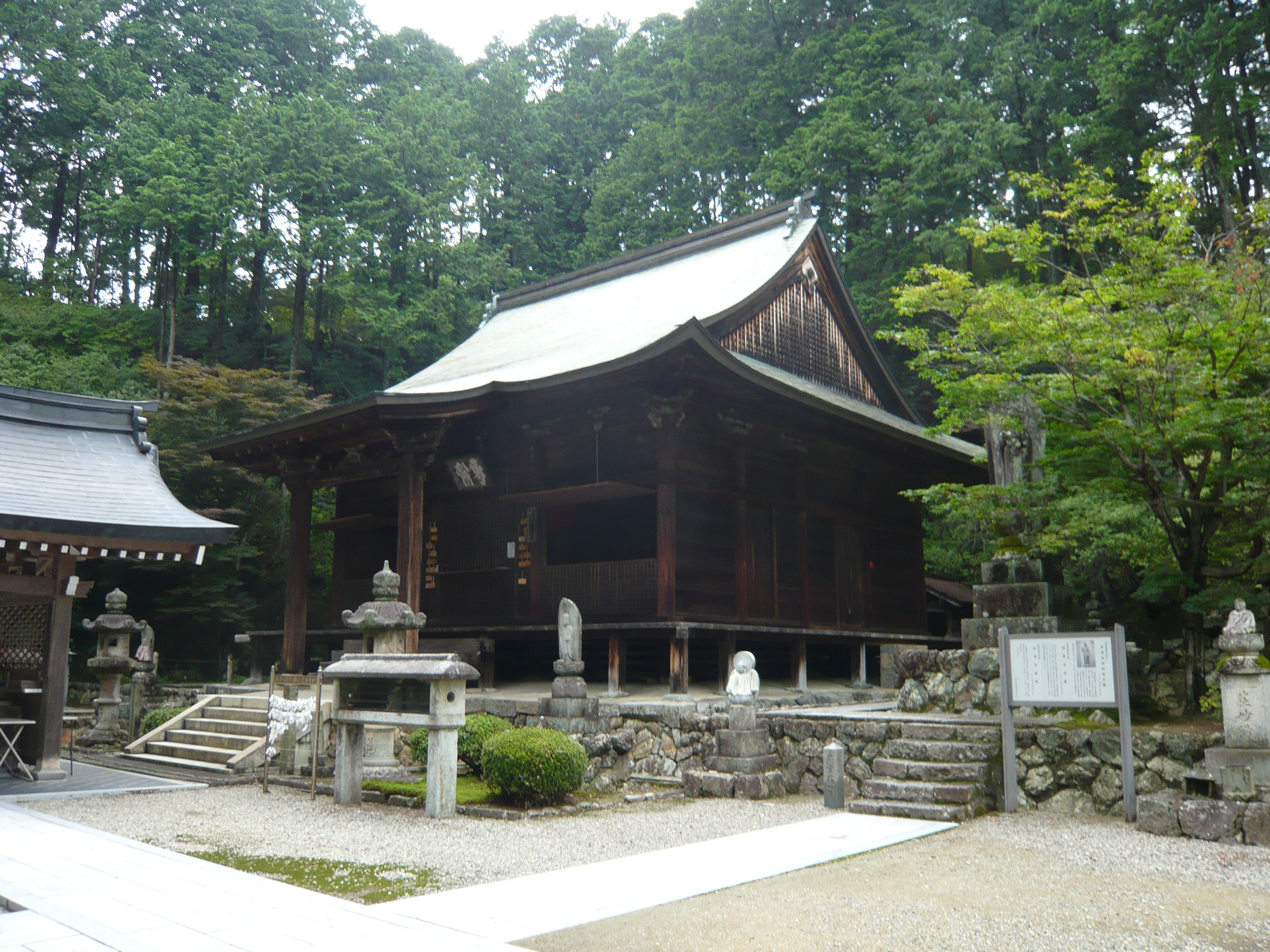 岩井山延算寺（岩井山かさ神）、本堂（県重要文化財）